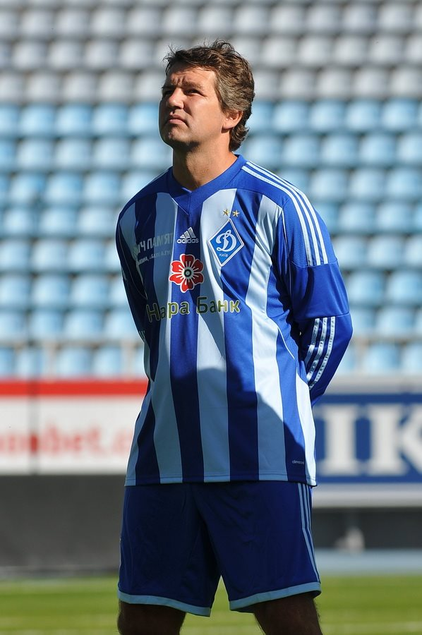 Олег Саленко на Матчі пам'яті Белькевича, Баля і Гусіна